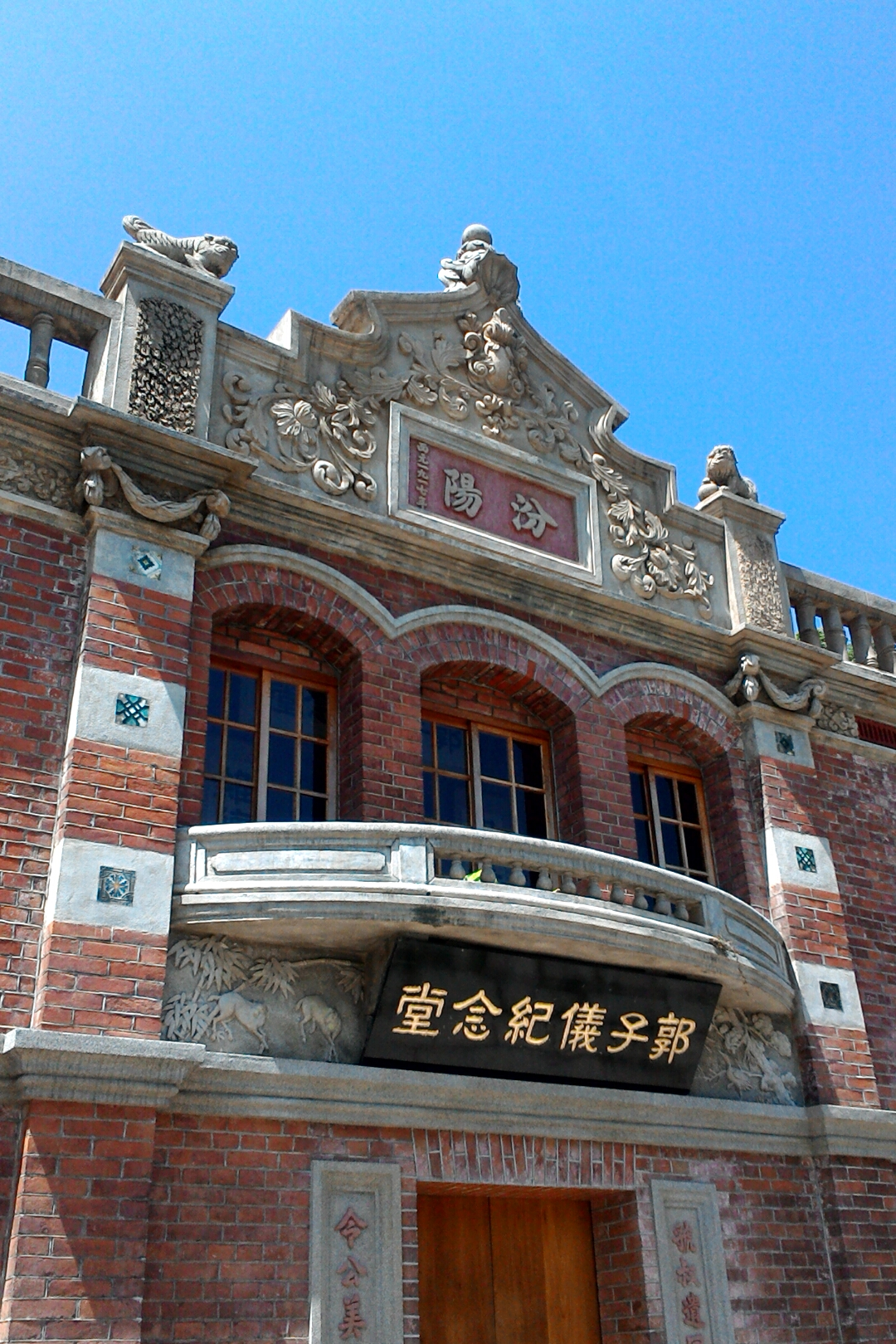 內湖郭氏古宅近景,台北市內湖區紫陽次分區紫陽里